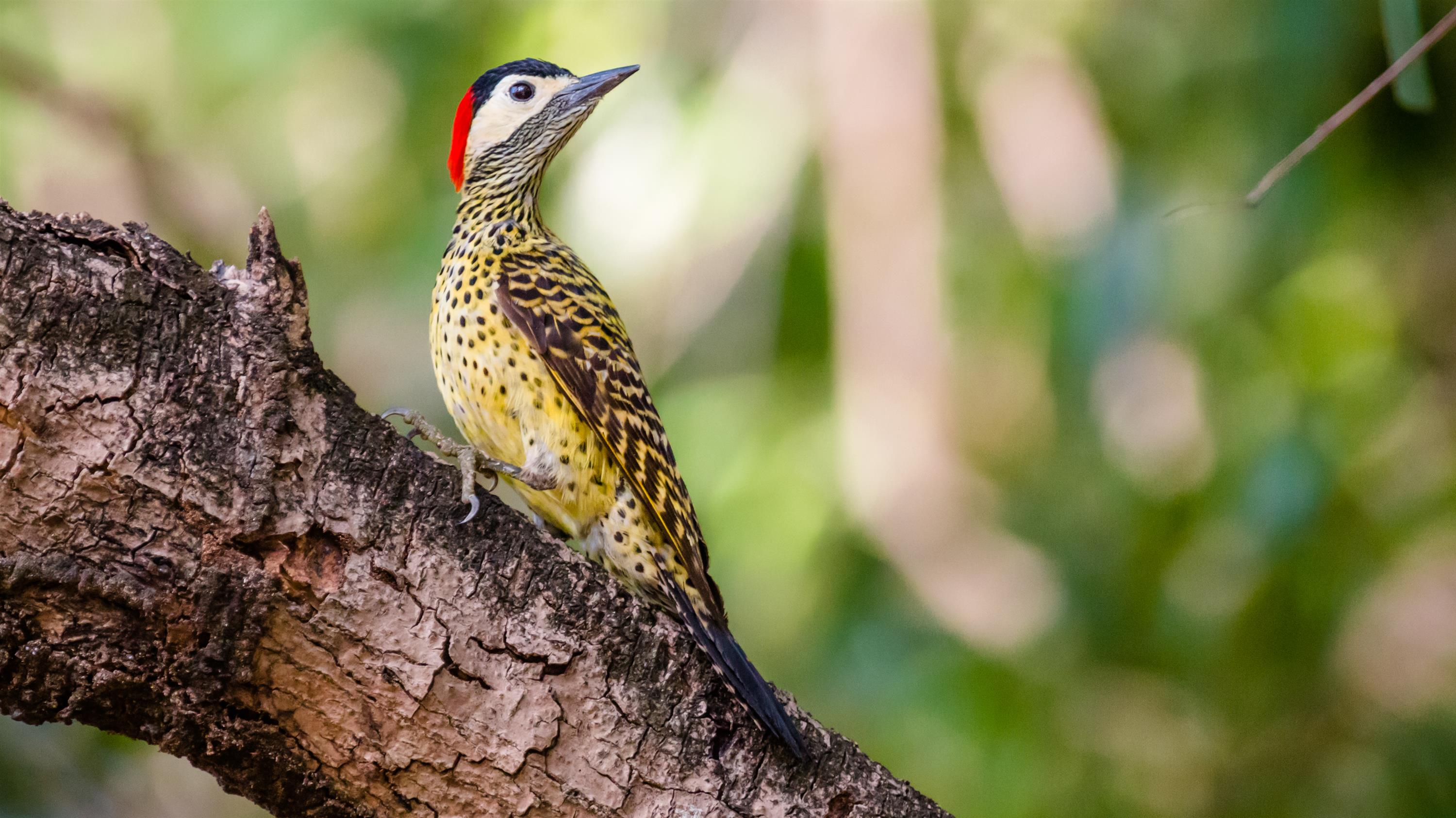 Uma das muitas espécies de pássaros que ocorrem no Parque Ecológico do Cocó